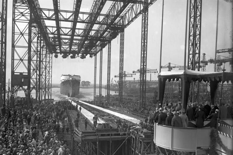 Der feierliche Stapellauf des größten Ozeandampfers "Bremen" fand unter Anwesenheit des Reichspräsidenten von Hindenburg in Bremen statt. Der 46.000 to grosse Ozeanriese "Bremen" während des feierlichen Stapellaufes. Im Vordergrund die Taufkanzel mit dem Reichspräsidenten von Hindenburg.